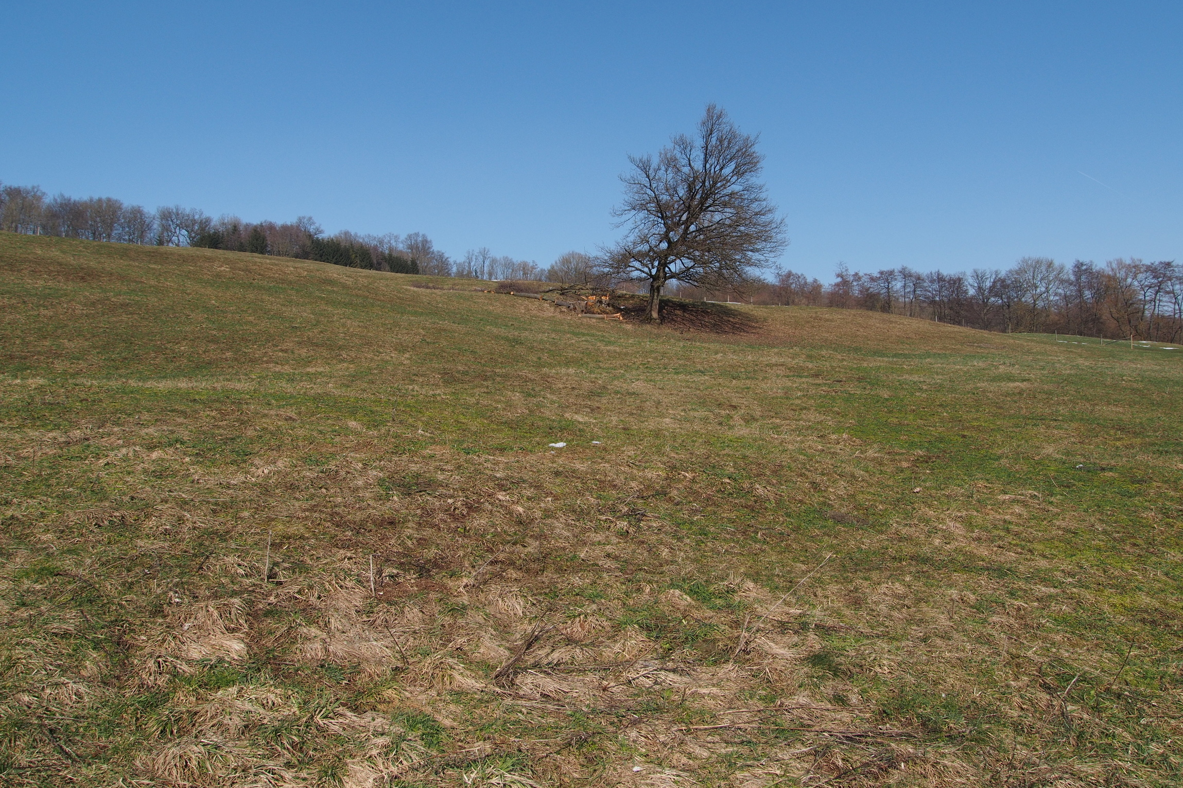 Knollenmergelwiese bei Leinzell